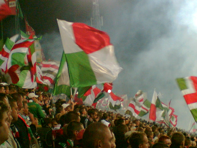 Legia - Polonia 1-0, derby Warszawy 2005